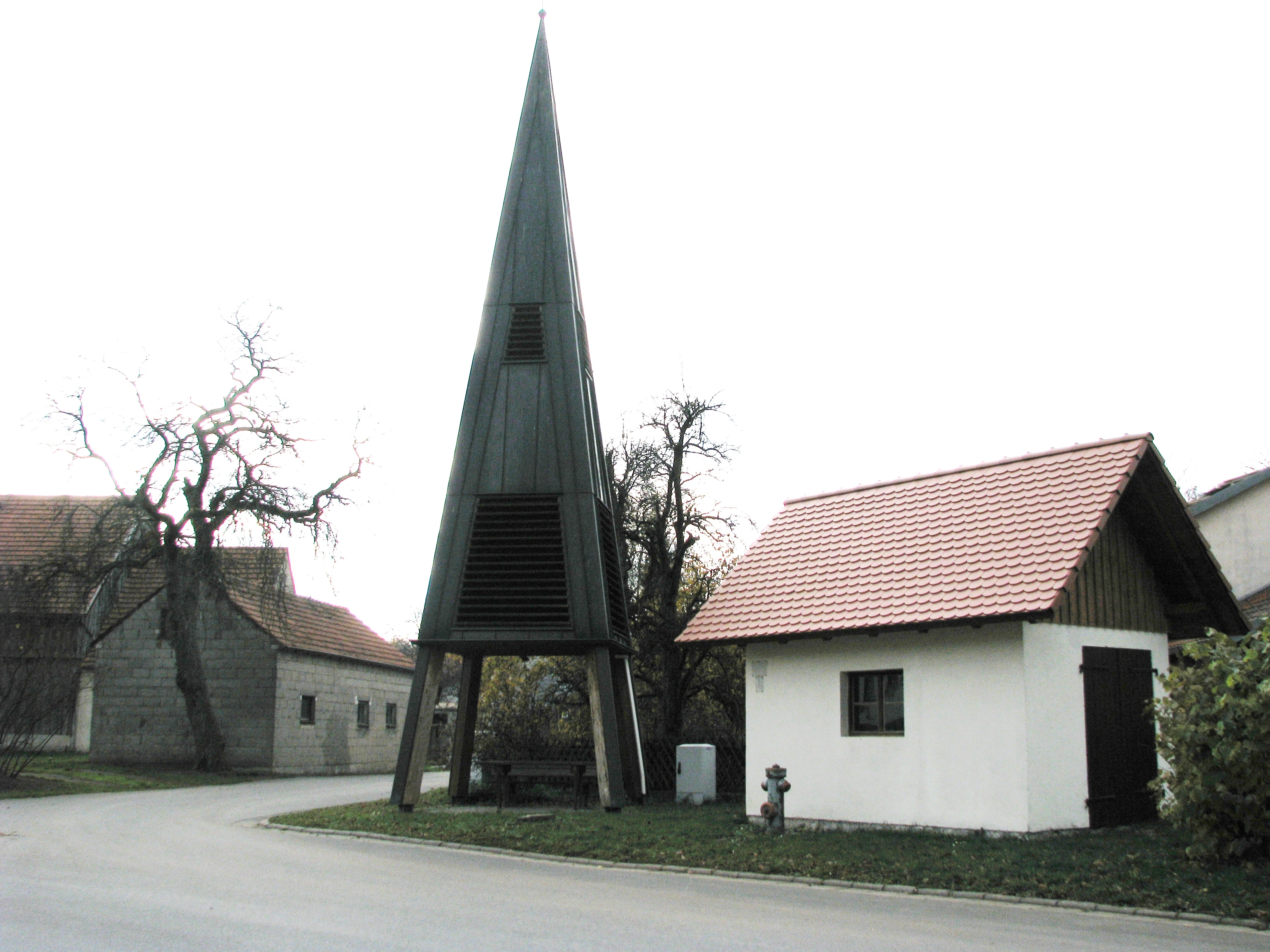 Ohausen, Ortsteil von Freystadt im Landkreis Neumarkt in der Oberpfalz in Bayern, Ortsmitte